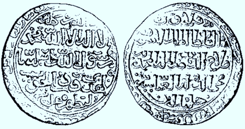 Denario del sultán mameluco Al-Ashraf Jalil.